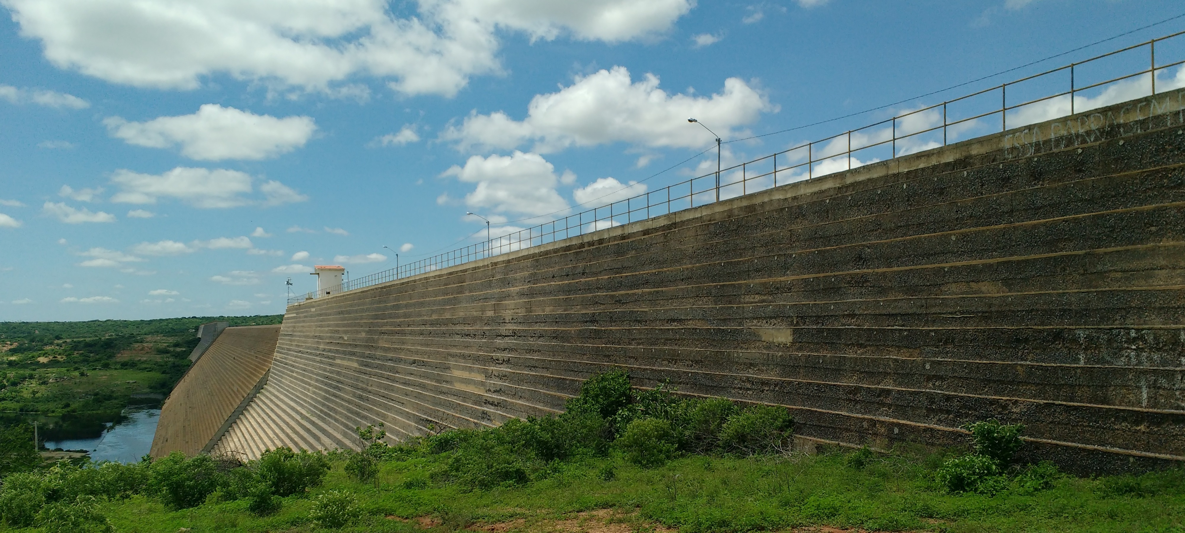 Vertedouro da barragem Santa Cruz de Apodi, Rio Grande do Norte (Brasil), com a parede do sangradouro ao fundo